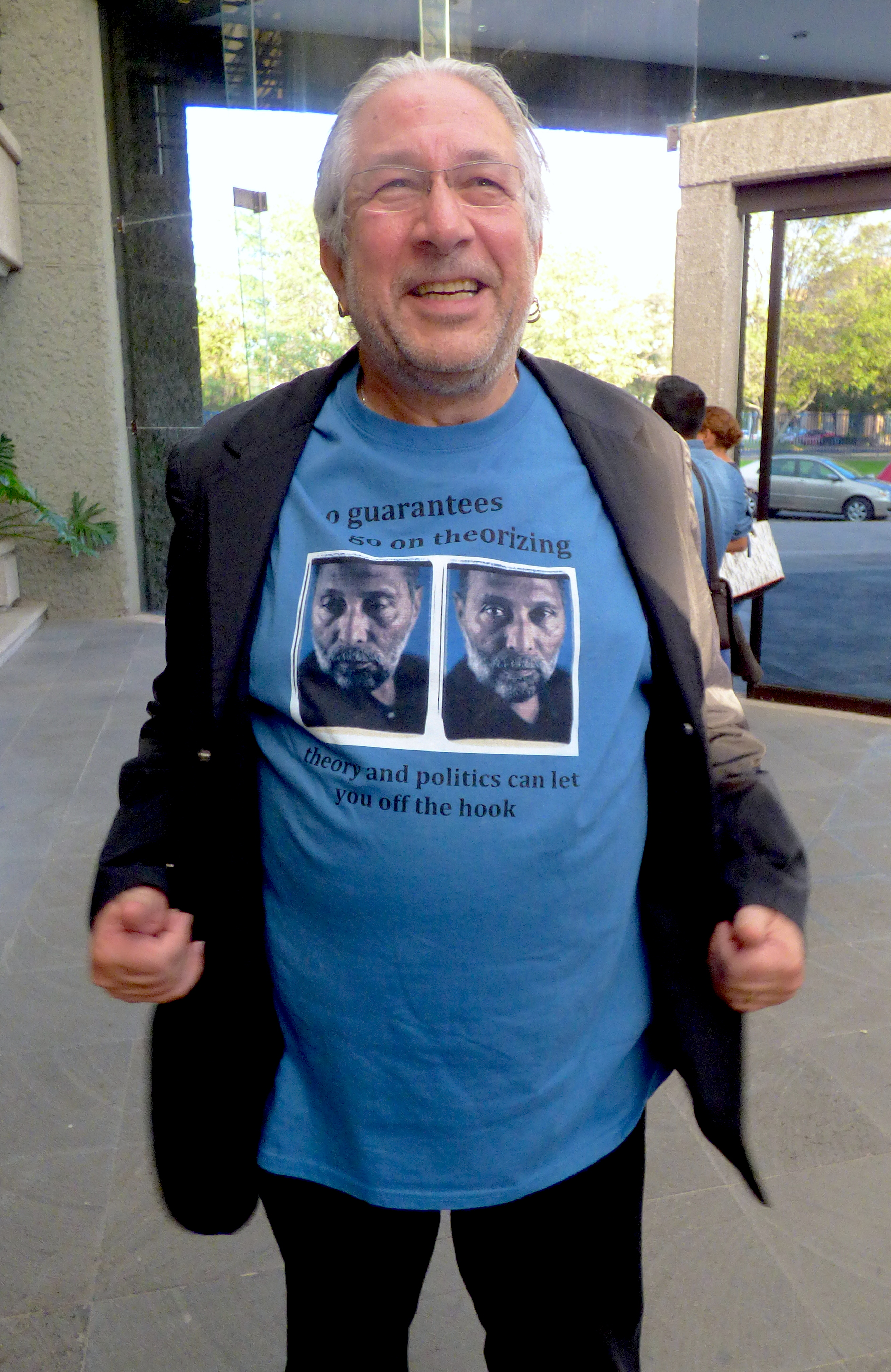 Lawrence Grossberg en la Universidad Autónoma de Aguascalientes, durante el I Congreso Cultura en América Latina en Memoria de Stuart Hall